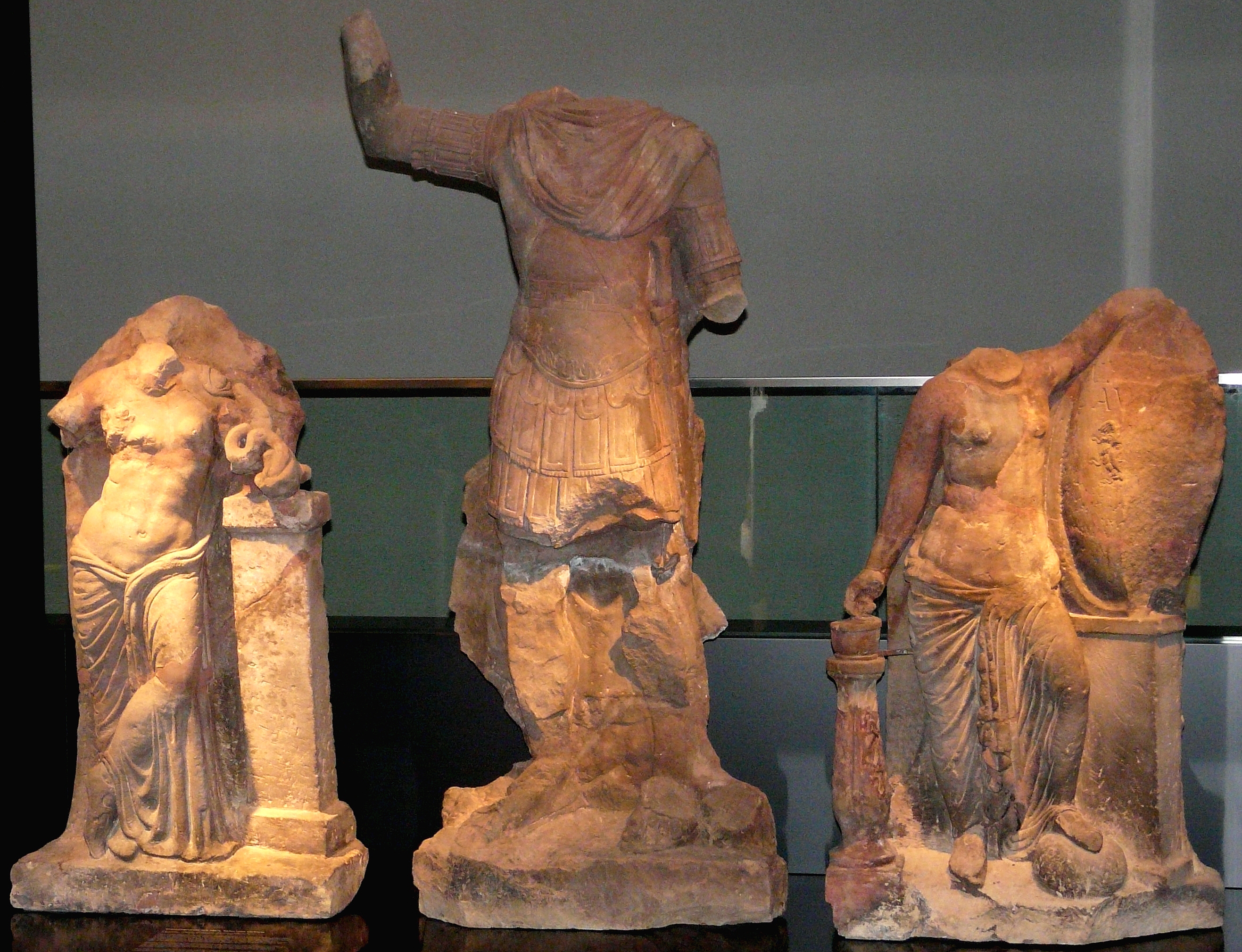 Statuengruppe vom Wachturm 10/37 „Schneidershecke“ des Odenwaldlimes im Römermuseum Osterburken